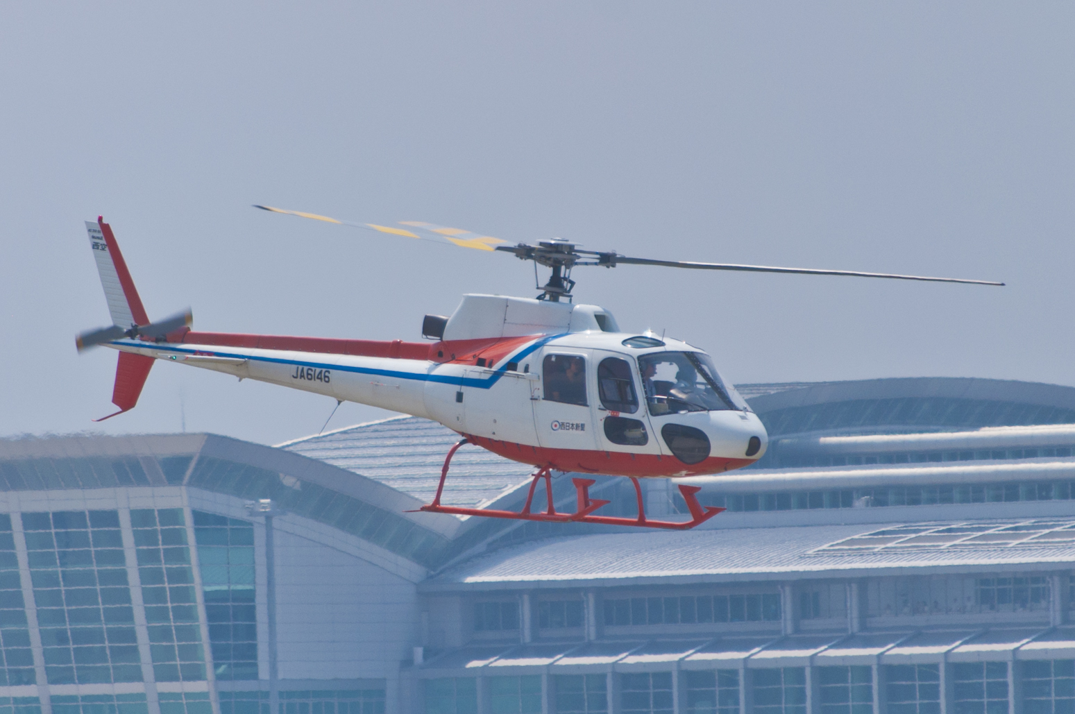 西日本航空のAS350。西日本新聞の報道ヘリとして運用中。福岡空港にて撮影。